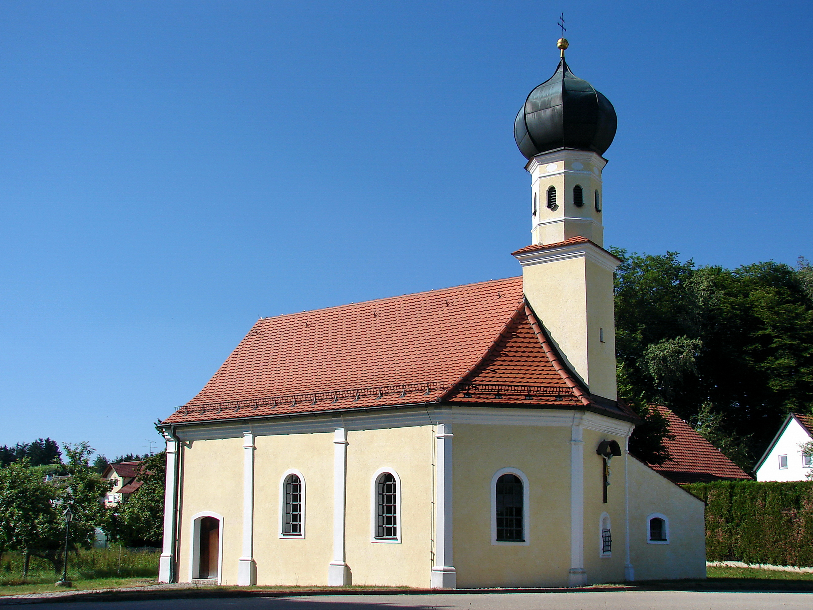 kleiner barocker Saalbau mit polygonalem Chor, angefügter Sakristei und Chortürmchen mit Zwiebelhaube, 1708; mit Ausstattung